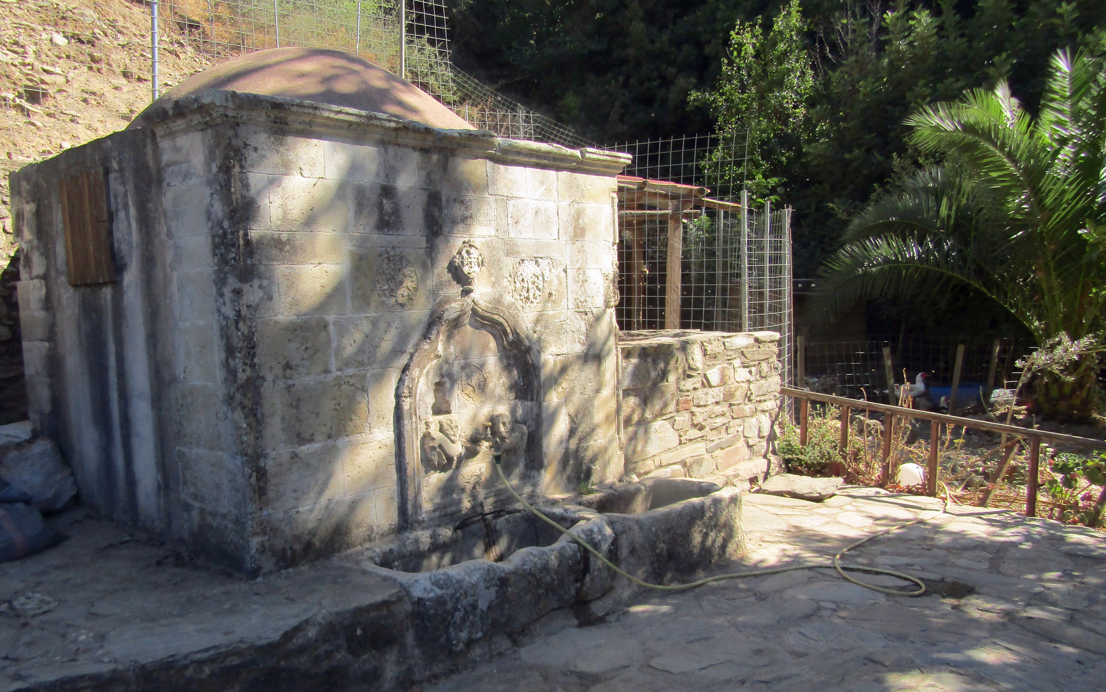 Monastero di San Panteleone (Fodele, Creta): antica fontana